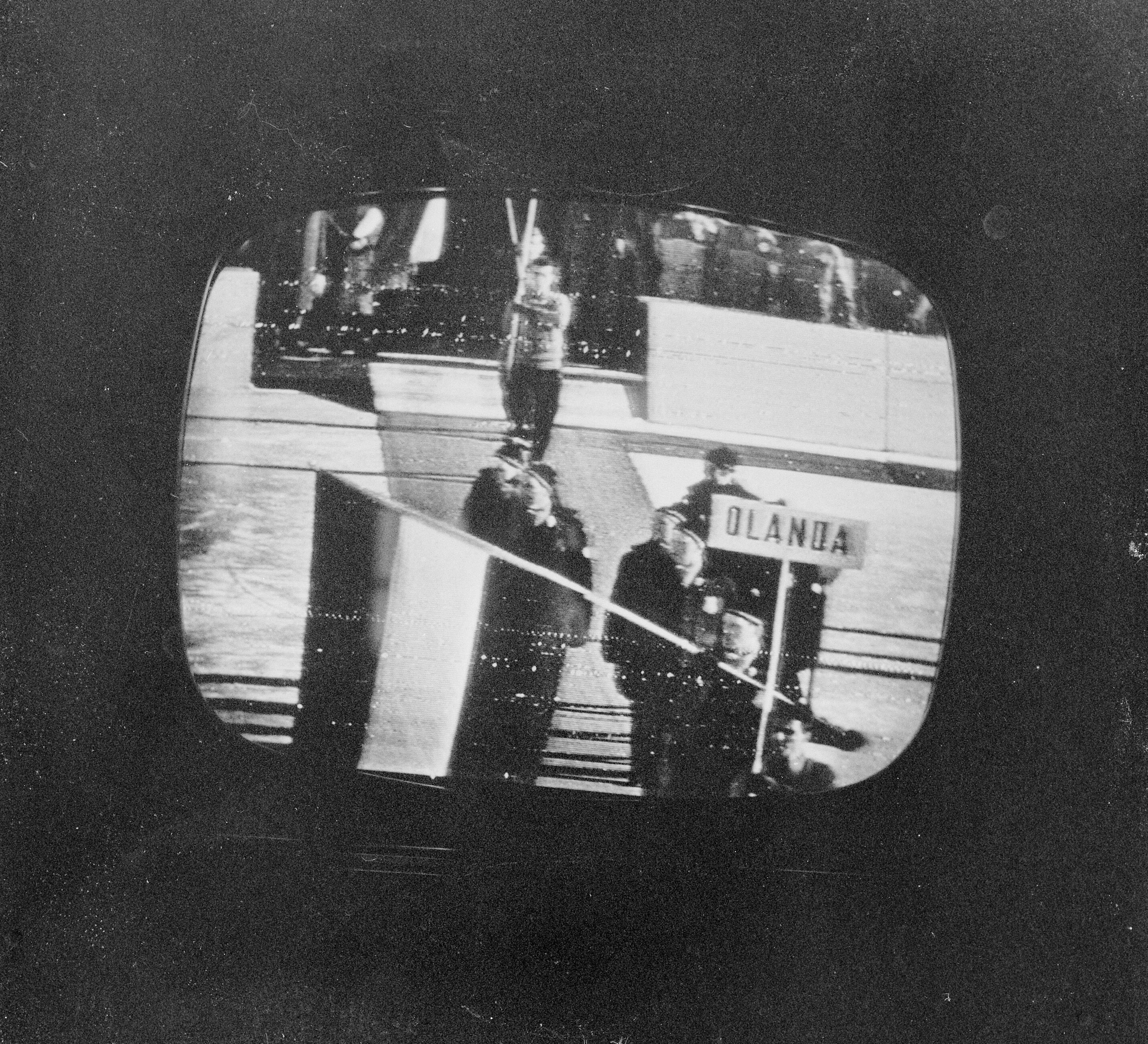 Collectie / Archief : Fotocollectie Anefo Reportage / Serie : [ onbekend ] Beschrijving : Opening Olympische Winterspelen in Cortina d'Ampezzo, intocht Nederland Datum : 26 januari 1956 Locatie : Cortina d'Ampezzo, Italië Trefwoorden : openingen, sport, televisie Fotograaf : Rossem, Wim van / Anefo Auteursrechthebbende : Nationaal Archief Materiaalsoort : Negatief (zwart/wit) Nummer archiefinventaris : bekijk toegang 2.24.01.03 Bestanddeelnummer : 907-5580